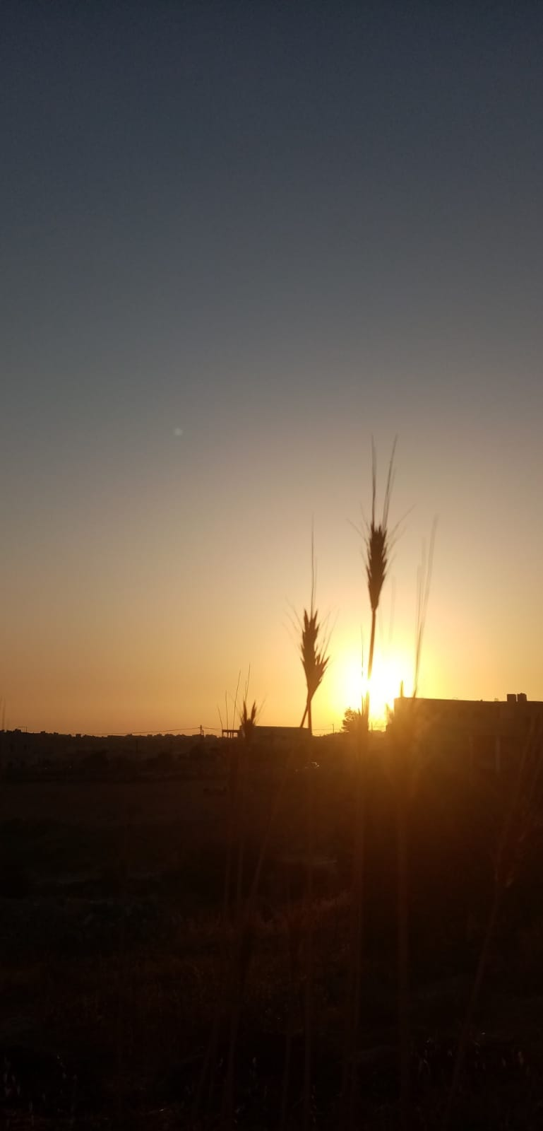 سنابل القمح مع الغروب